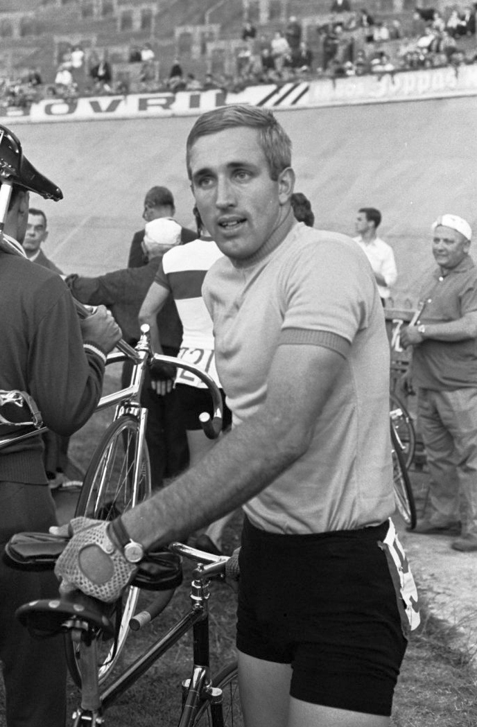 Wereldkampioenschappen wielrennen te Rocourt amateur sprinters. Piet van der Touw.